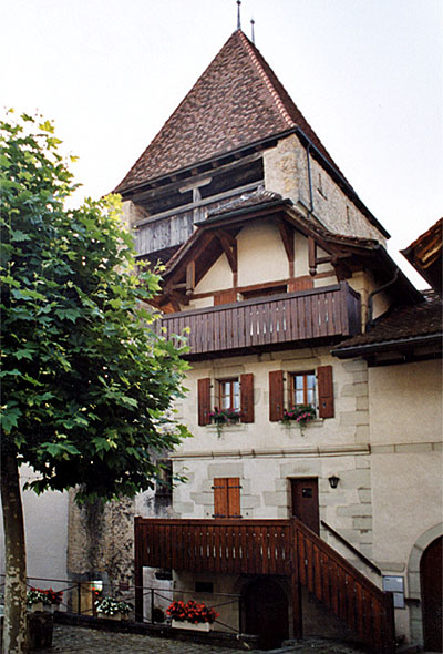 Avenches, Tour de Benneville (13. Jahrhundert)